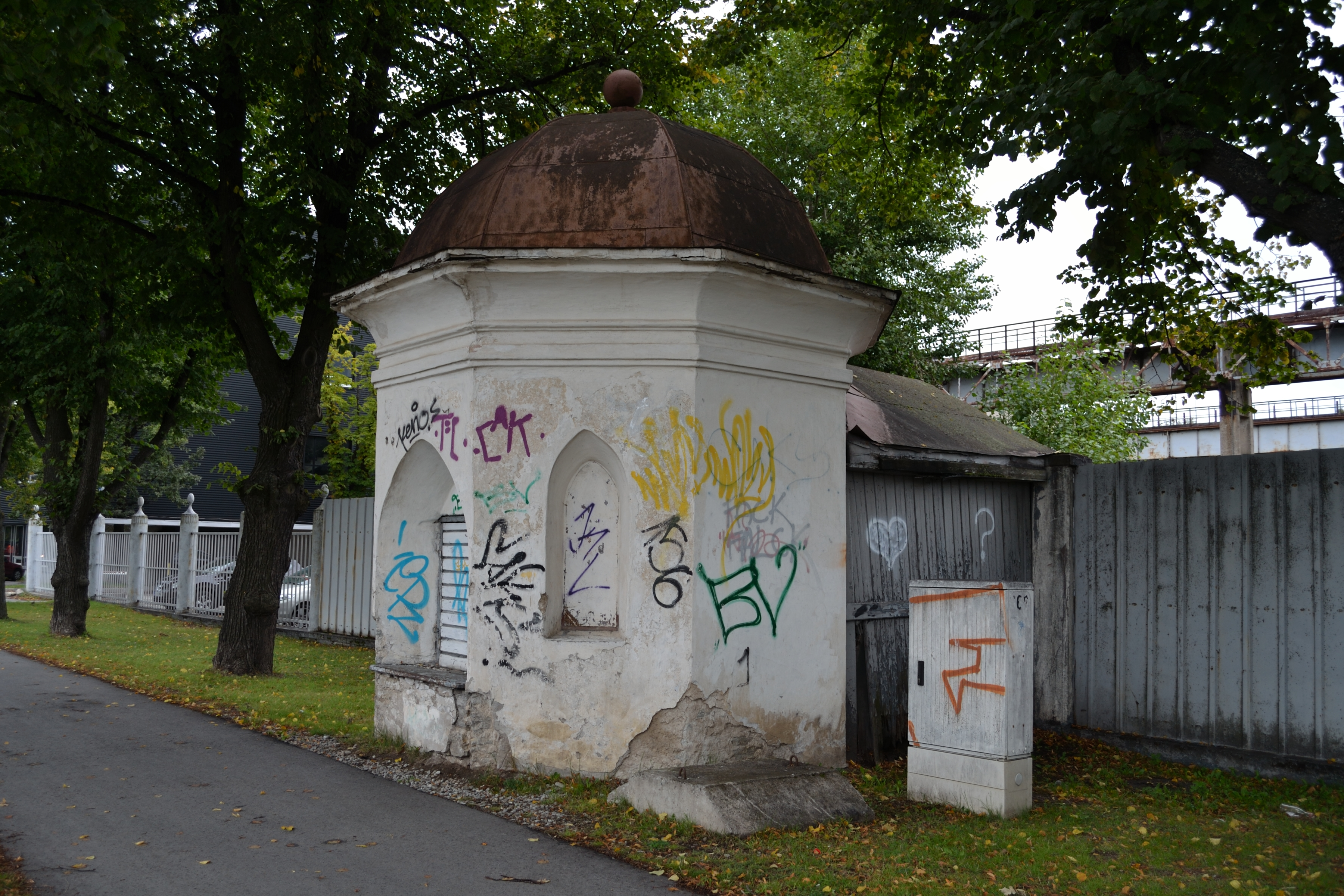 Tallinn, paviljon Kopli 70, 1931